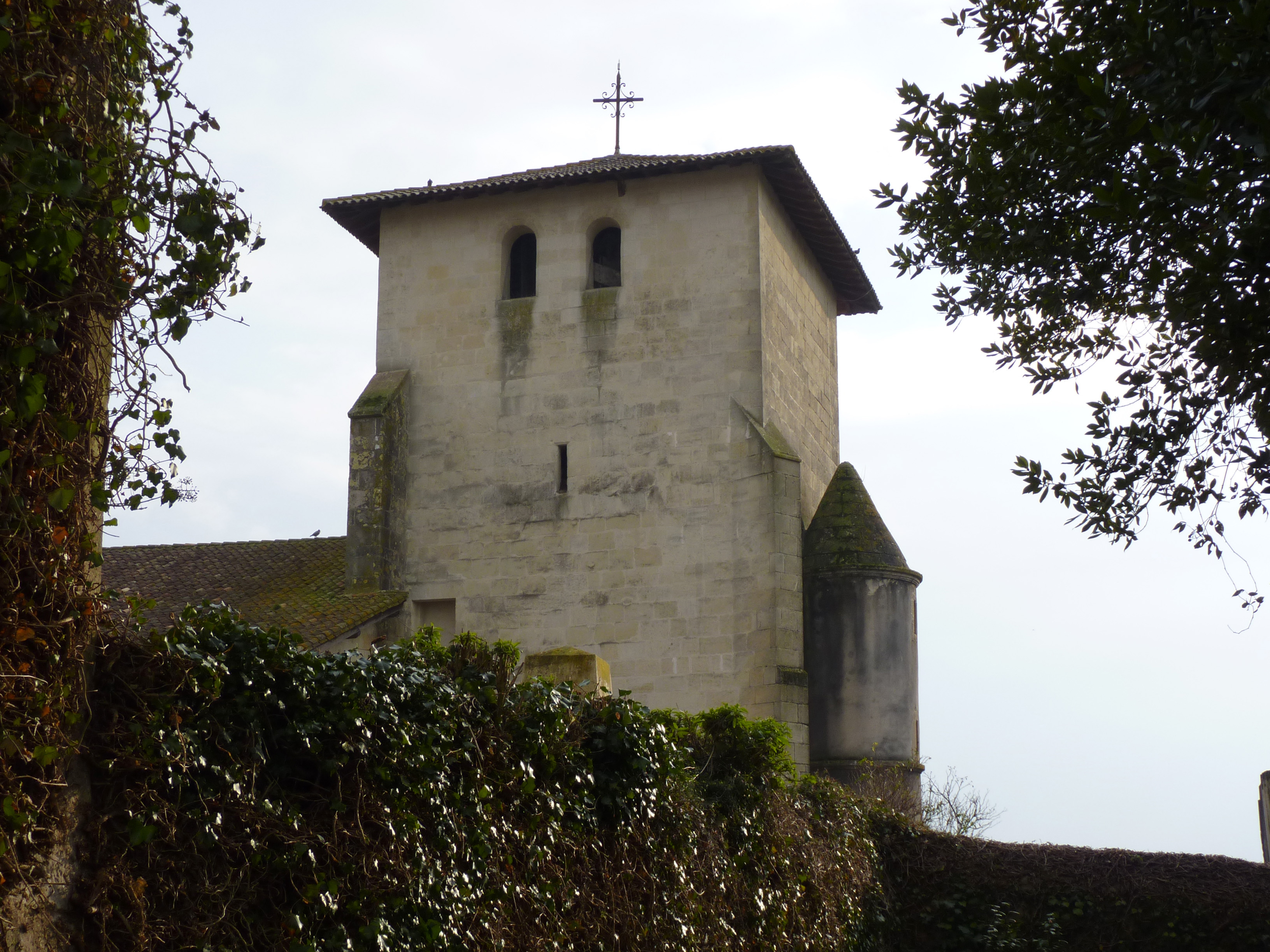 Clocher de l'église Saint-Pierre de Montfort-en-Chalosse